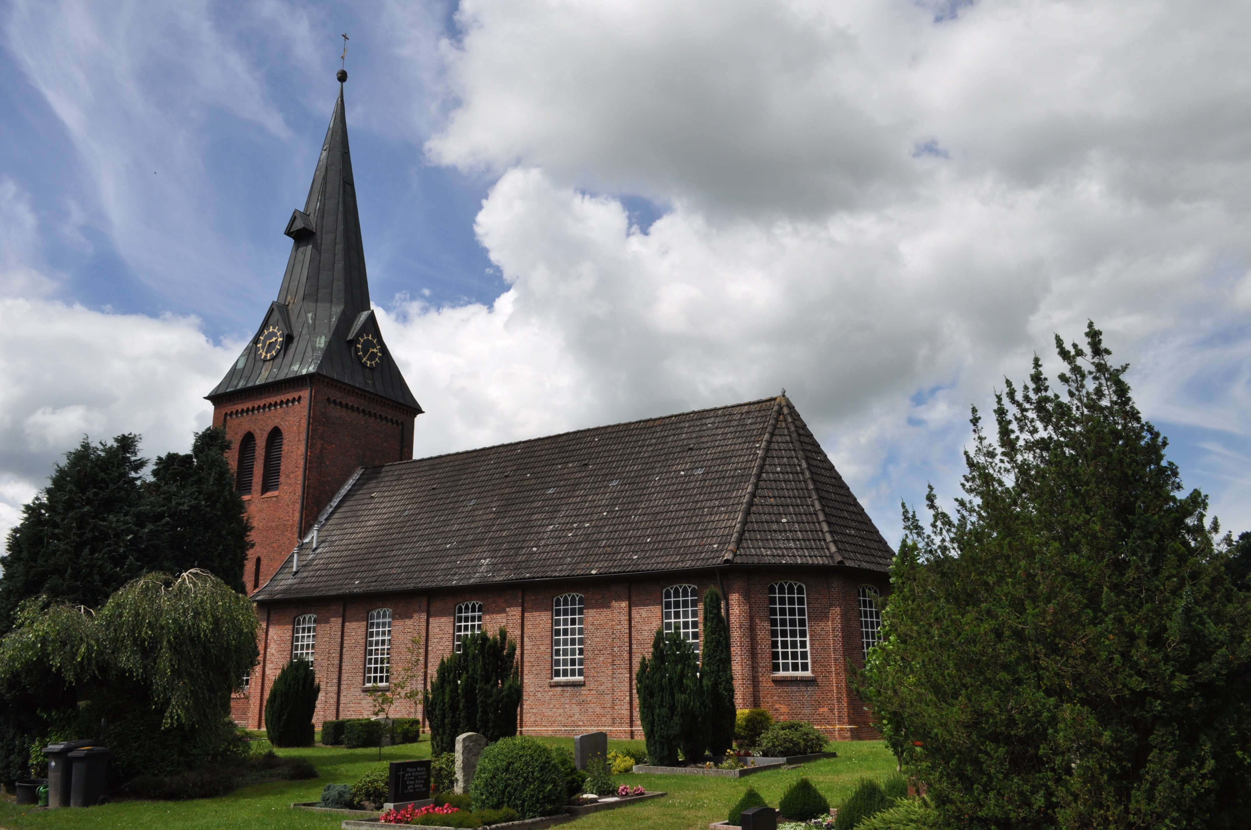 Kirche St. MIchaelis in Hemmoor-Basbeck, Blick von Südosten. This is a photograph of an architectural monument.